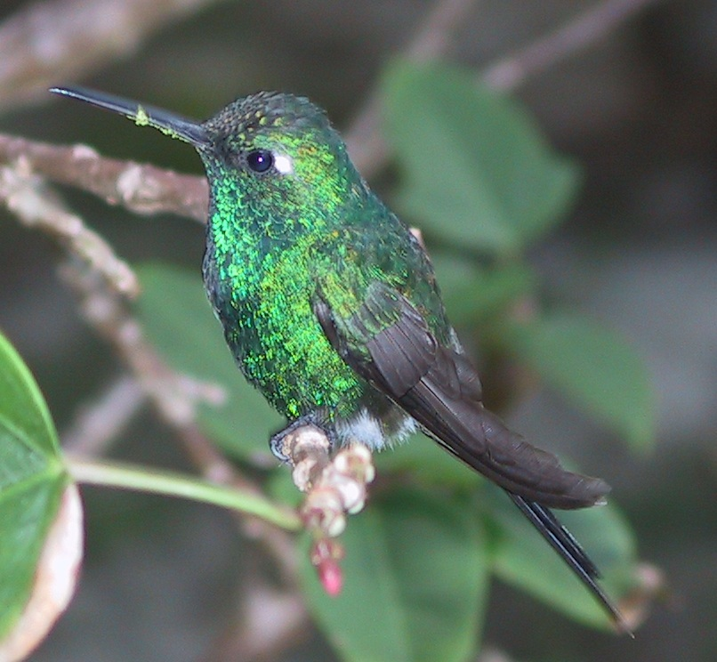 Chlorostilbon ricordii, Cuba, coast near Guardalavaca